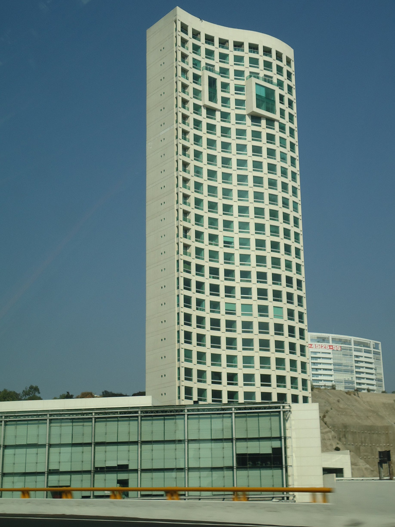 Torre Paragon Santa Fe DF